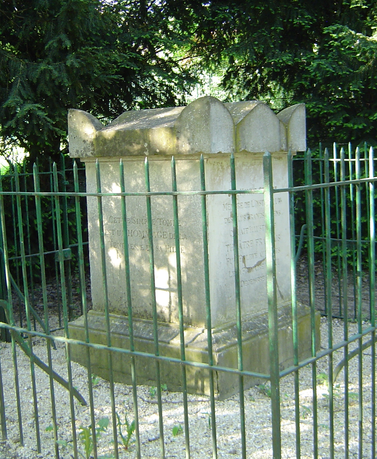 Antony